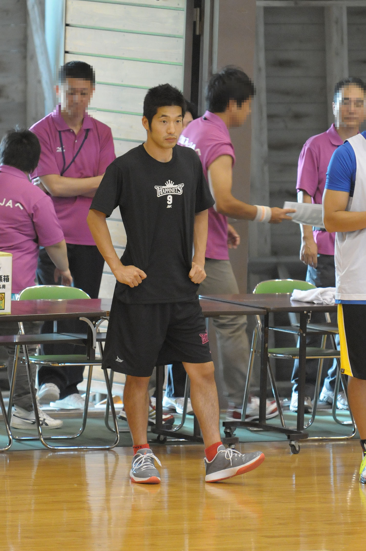 秋田ノーザンハピネッツ、小林祐太選手。広域五城目体育館で。